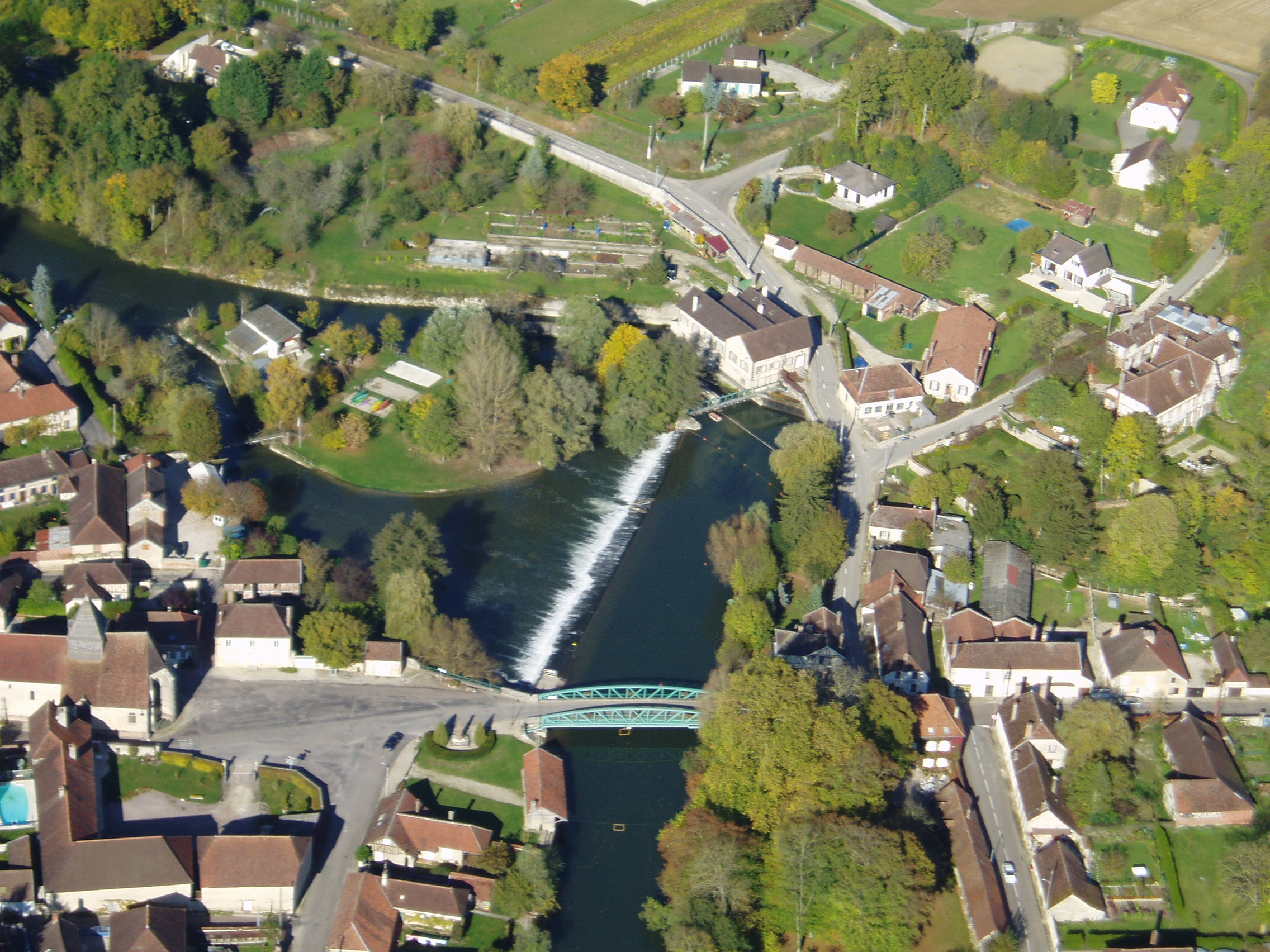 Site hydroélectrique de Chappes (Aube)